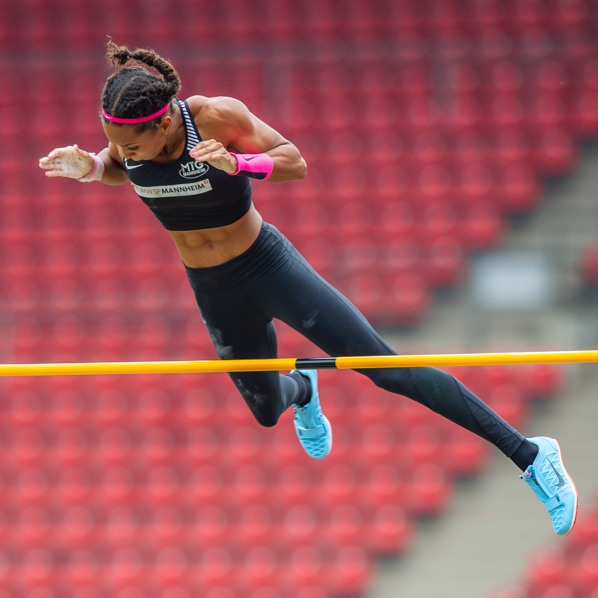 DLV,Deutsche Leichtathletik Meisterschaften 2018,Deutscher Leichtathletik-Verband,Jacqueline Otchere,MTG Mannheim,Max-Morlock-Stadion,Pole vault,Stabhochsprung